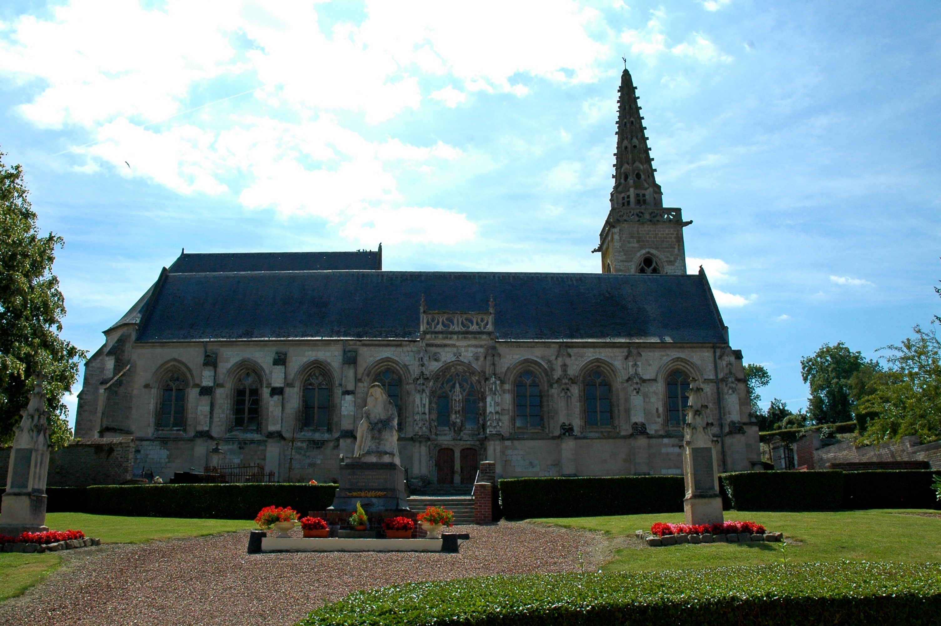 Église Saint-Riquier de Fontaine-sur-Somme (Somme, France), façade nord.